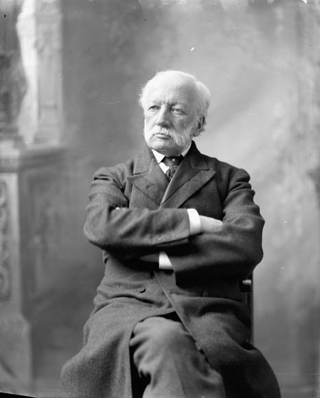 Grant, James Alexander Sir M.D. 1831 - Feb. 5, 1920